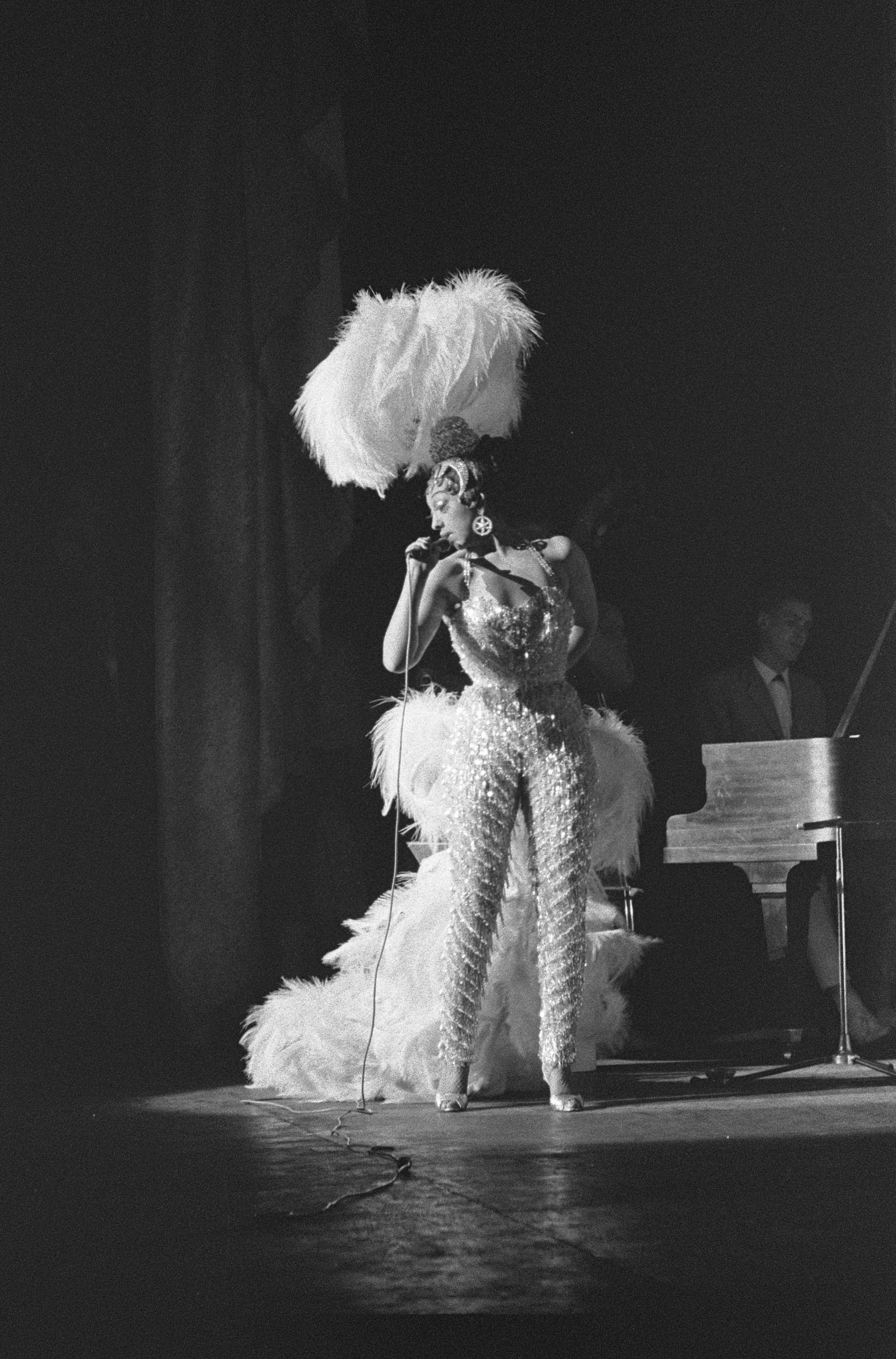 Collectie / Archief : Fotocollectie Anefo Reportage / Serie : [ onbekend ] Beschrijving : Nachtoptreden van Josephine Baker in het Citytheater te Amsterdam Datum : 12 november 1960 Locatie : Amsterdam, Noord-Holland Trefwoorden : Nachtoptredens Persoonsnaam : Baker, Josephine Instellingsnaam : City Theater Fotograaf : Pot, Harry / Anefo Auteursrechthebbende : Nationaal Archief Materiaalsoort : Negatief (zwart/wit) Nummer archiefinventaris : bekijk toegang 2.24.01.05 Bestanddeelnummer : 911-7669